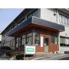 ダイト工業 本社写真